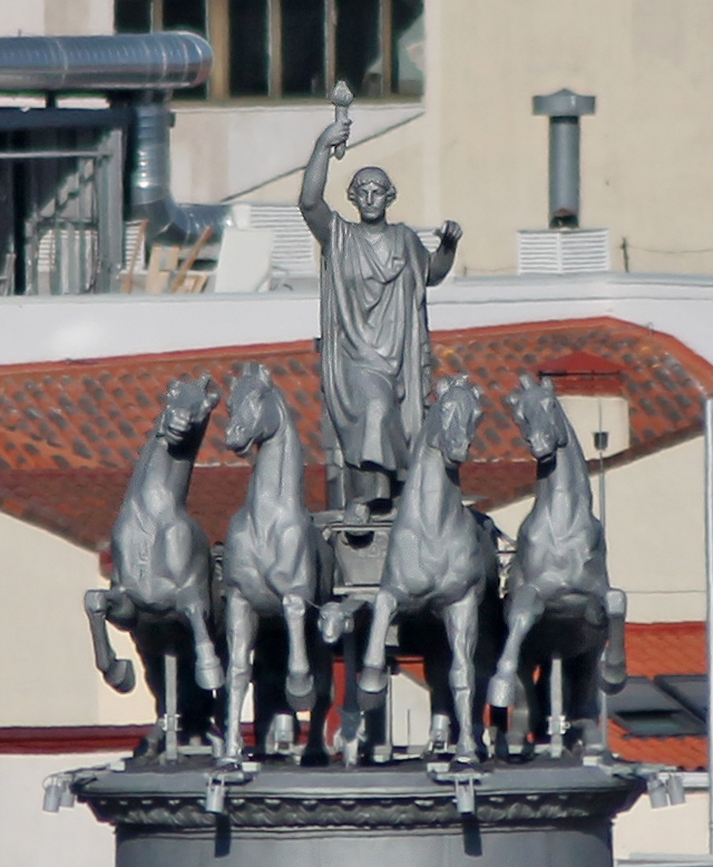 Aurora